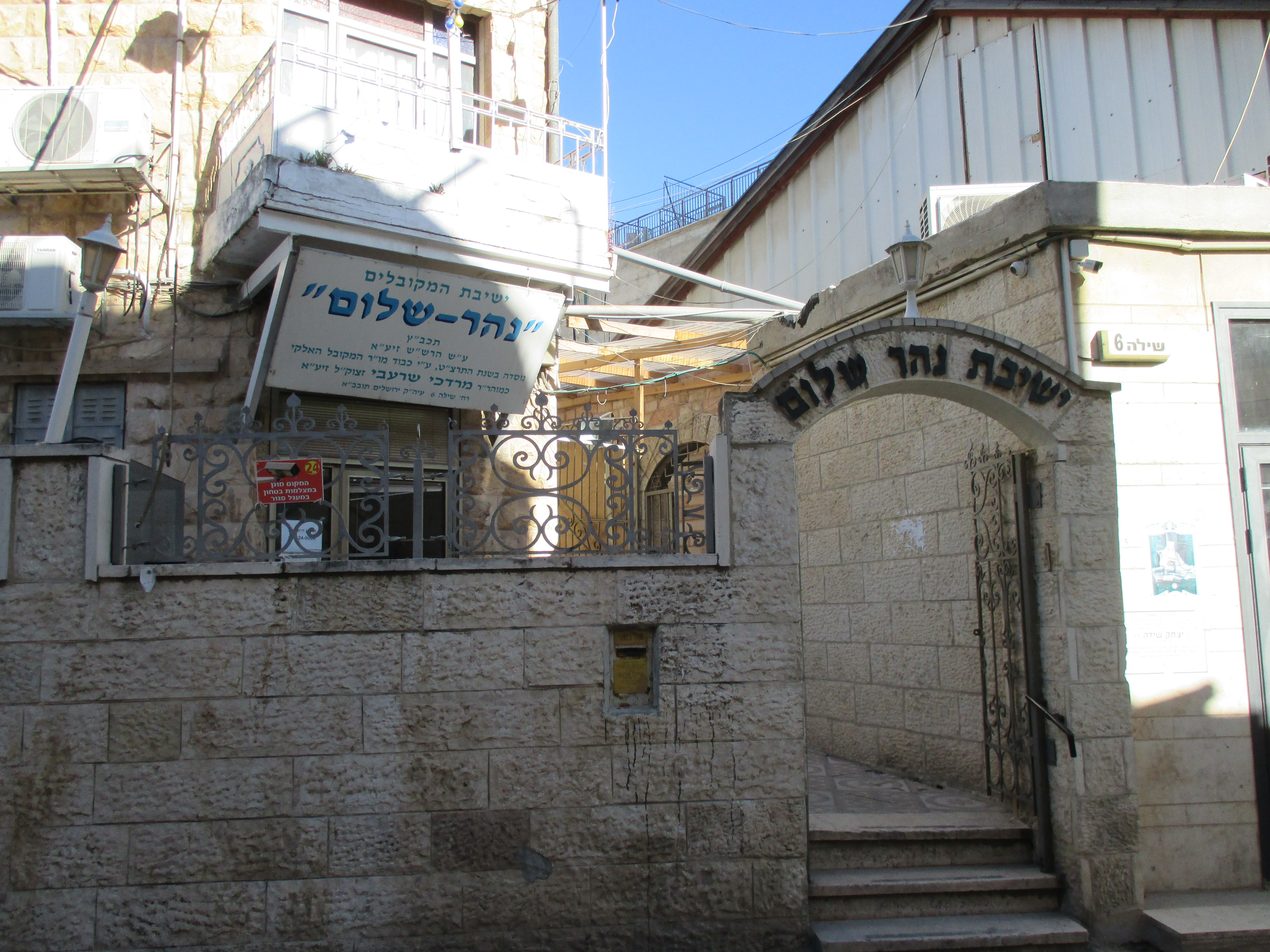 ישיבת נהר שלום בסמוך לשוק מחנה יהודה בירושלים